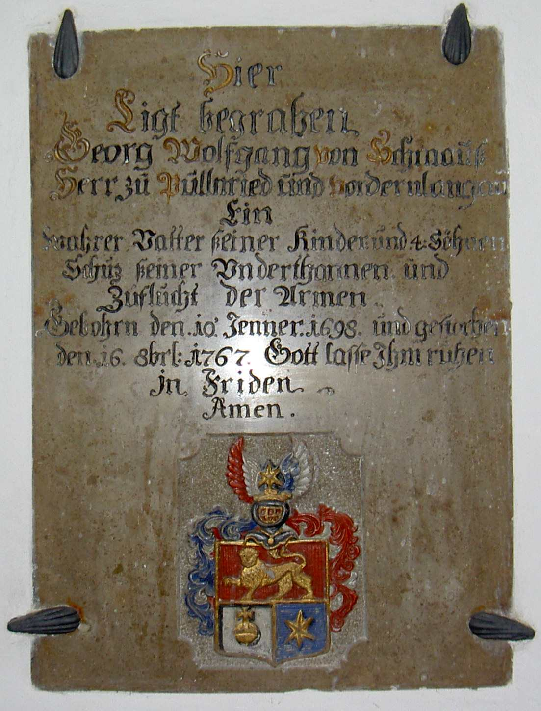 Pullenried, Grabplatte in der Kirche St. Vitus, mit Wappen Schmauß